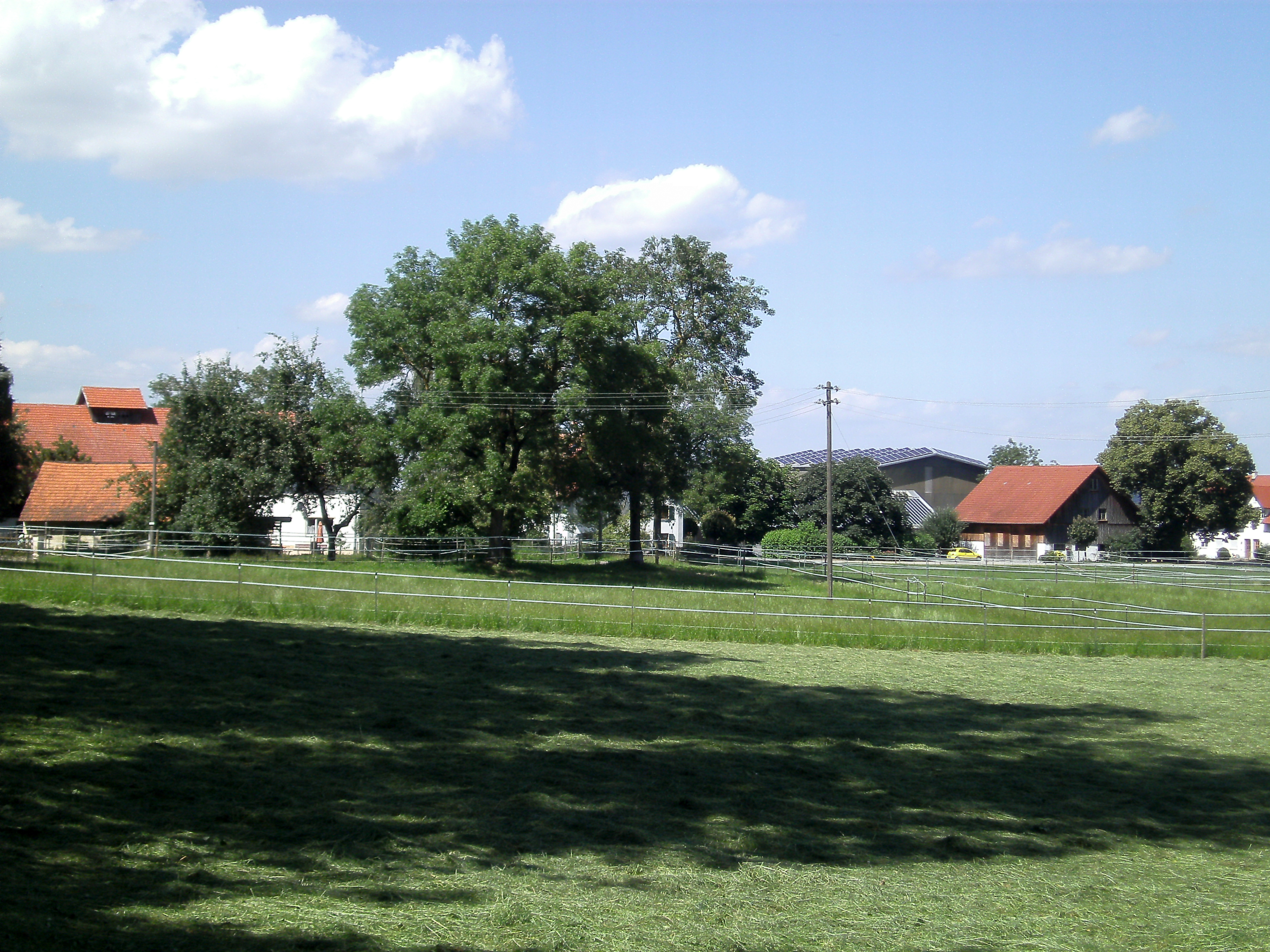 Haldau